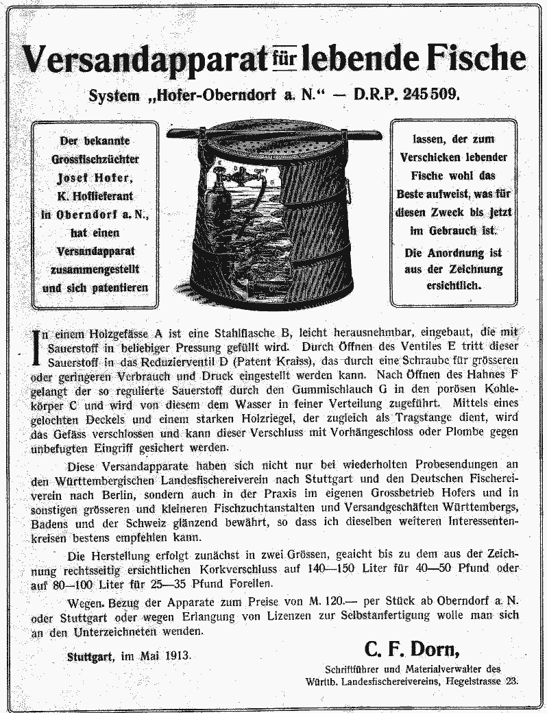 Werbung für den patentierten "Versandapparat für lebende Fische - System Hofer Oberndorf a.N." von 1912 des Versandaparats für lebende Fische von Josef Hofer (Patentschrift Nr. 145509, Kaiserliches Patentamt 11. April 1912) zum Transport lebender Fische mit Hilfe von Sauerstoff aus der Flasche.